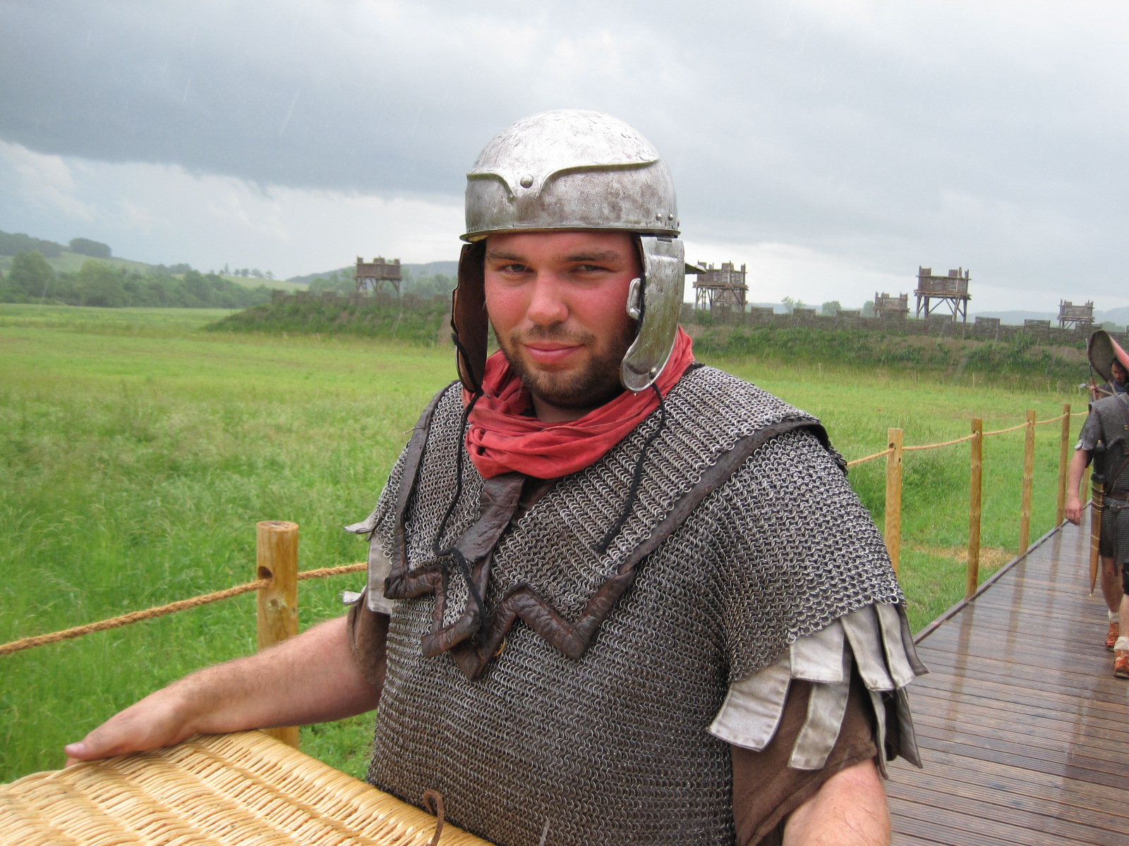 Muséoparc d'Alésia